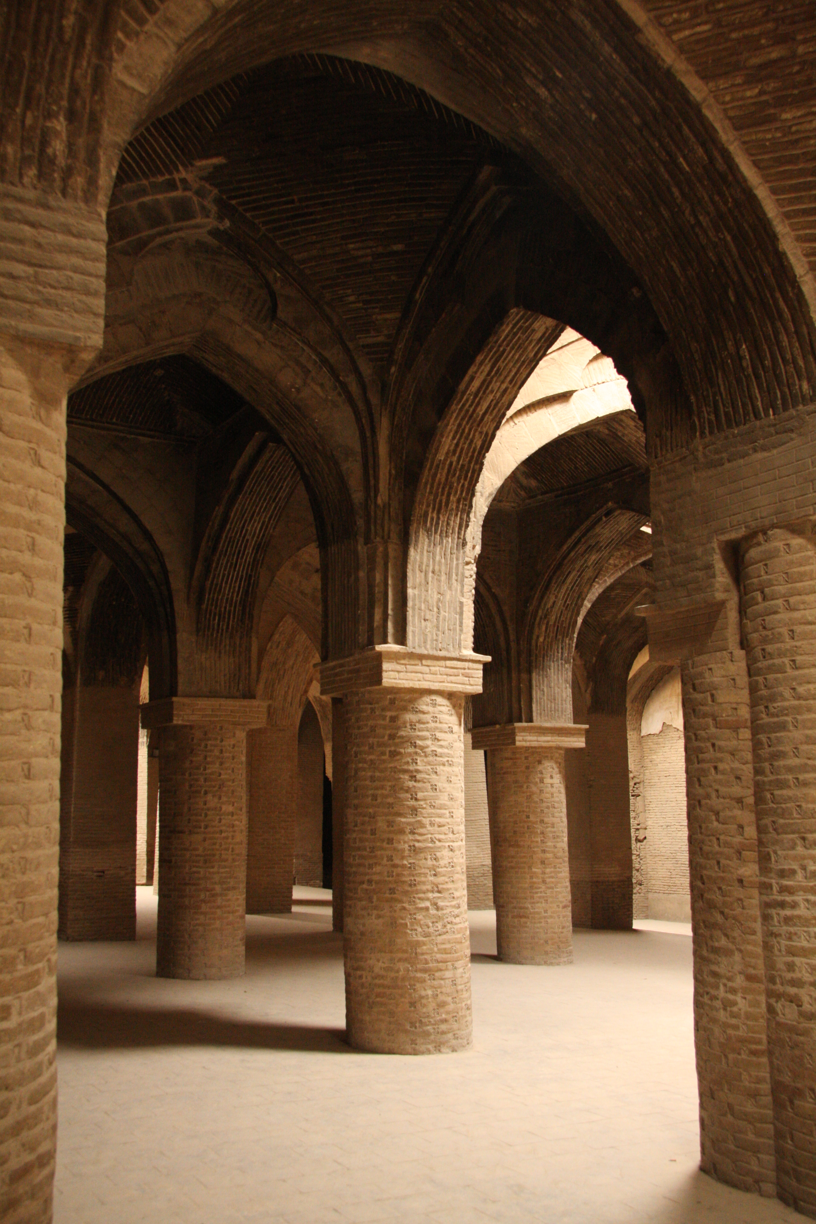 مسجد جامع اصفهان